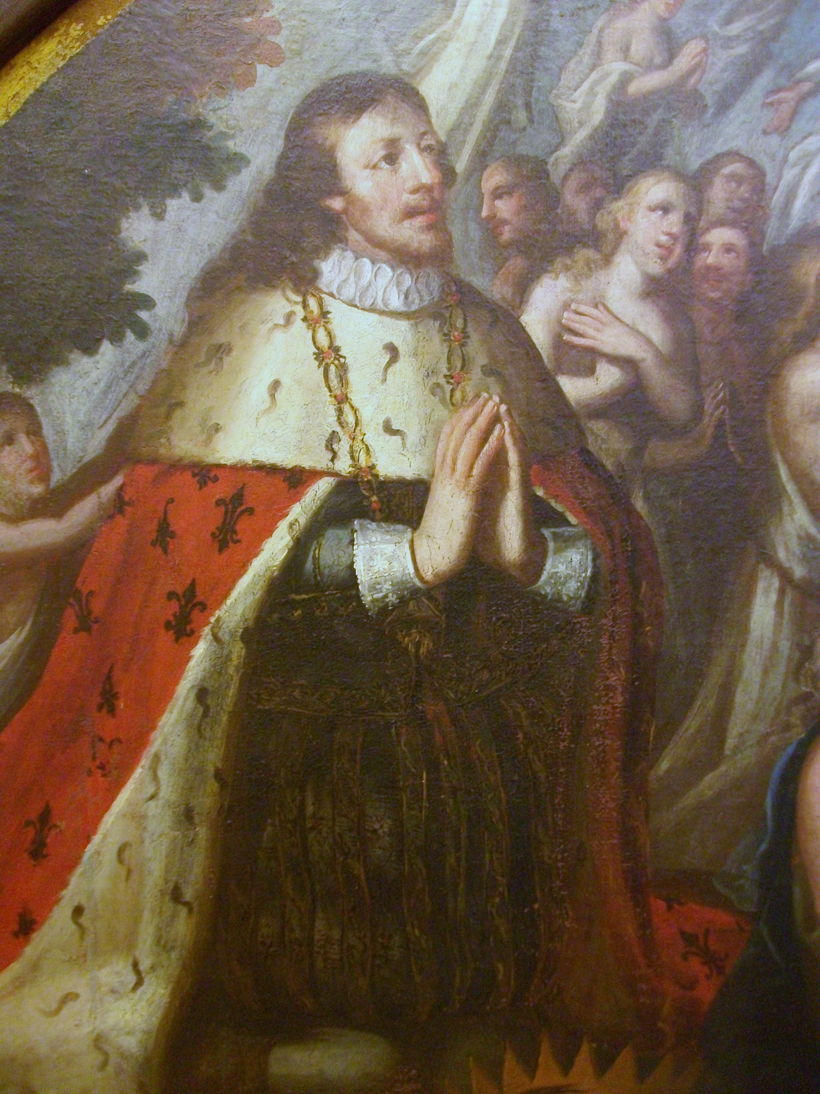 Detall del quadre Visió del rei Martí I, Josep Vergara Gimeno (1726-1799), Museu d Belles Arts de Castelló. Oli sobre llenç, 130 x 390 cm. (lluneta). Procedeix de la cartoixa de Valldecrist.